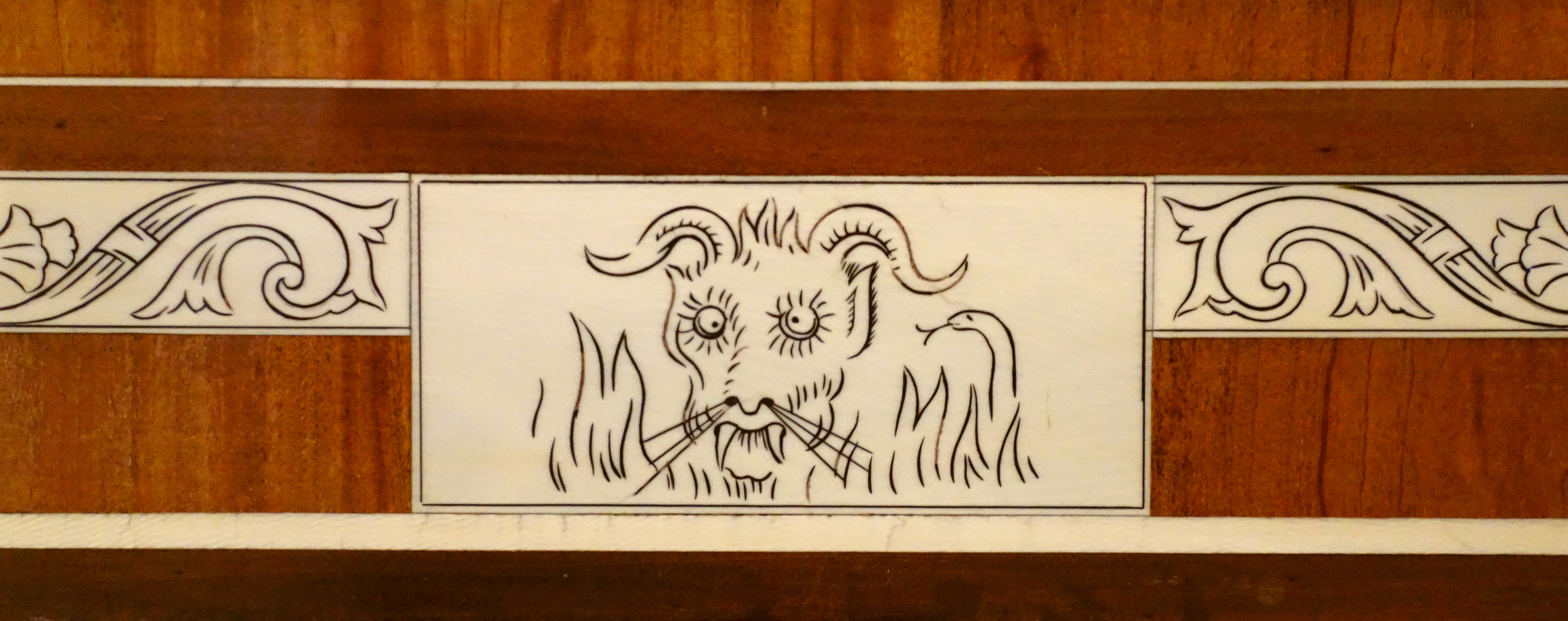 Tändstickspalatset Sessionssal, bordet, intarsia